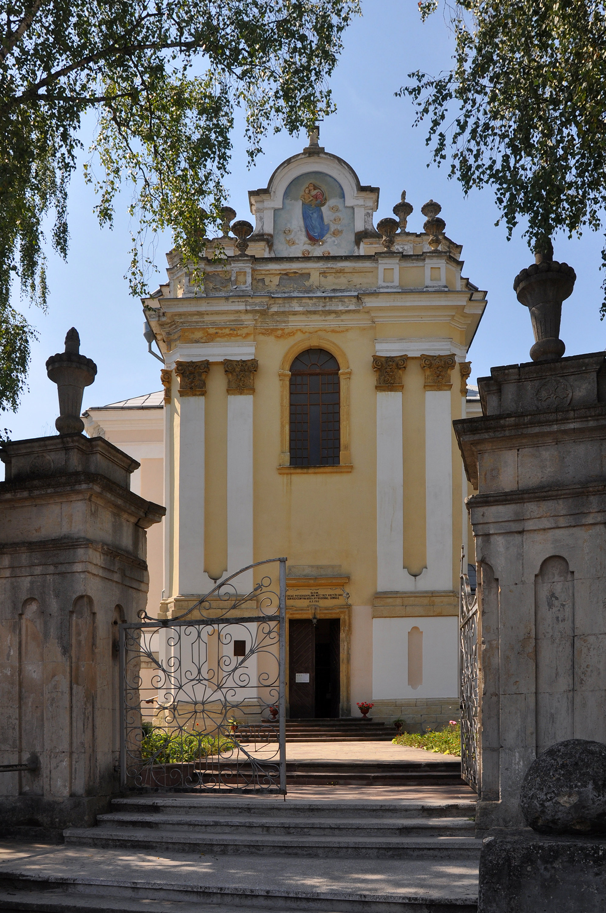 Костел Внебовзяття Пресвятої Діви Марії (мур.), Бучач, вул. Мулярська, 2